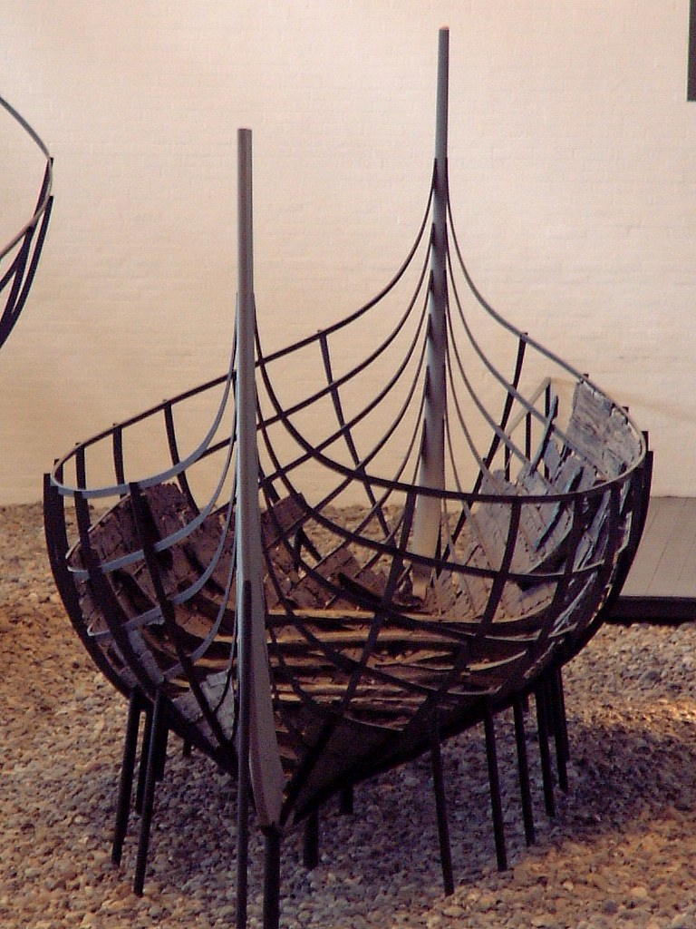 Skuldelev VI: Ein wikingerzeitliches Ruder- und Segelboot, das im Roskilde-Fjord in der Nähe von Skuldelev gefunden wurde.